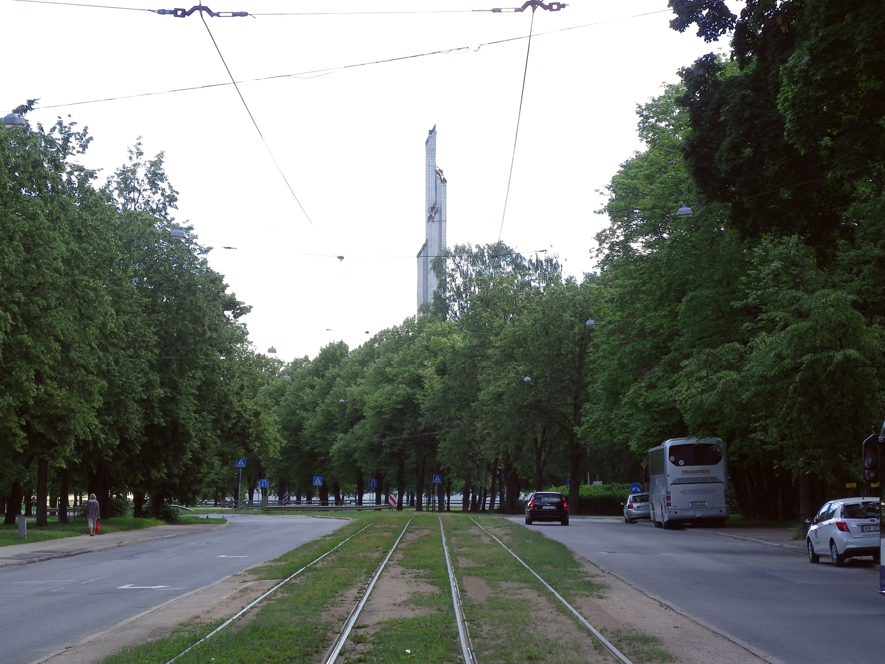 Bāriņu iela Rīgā